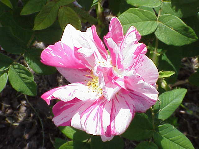 Species: Rosa gallica Family: Rosaceae Cultivar: versicolor Image No. 10